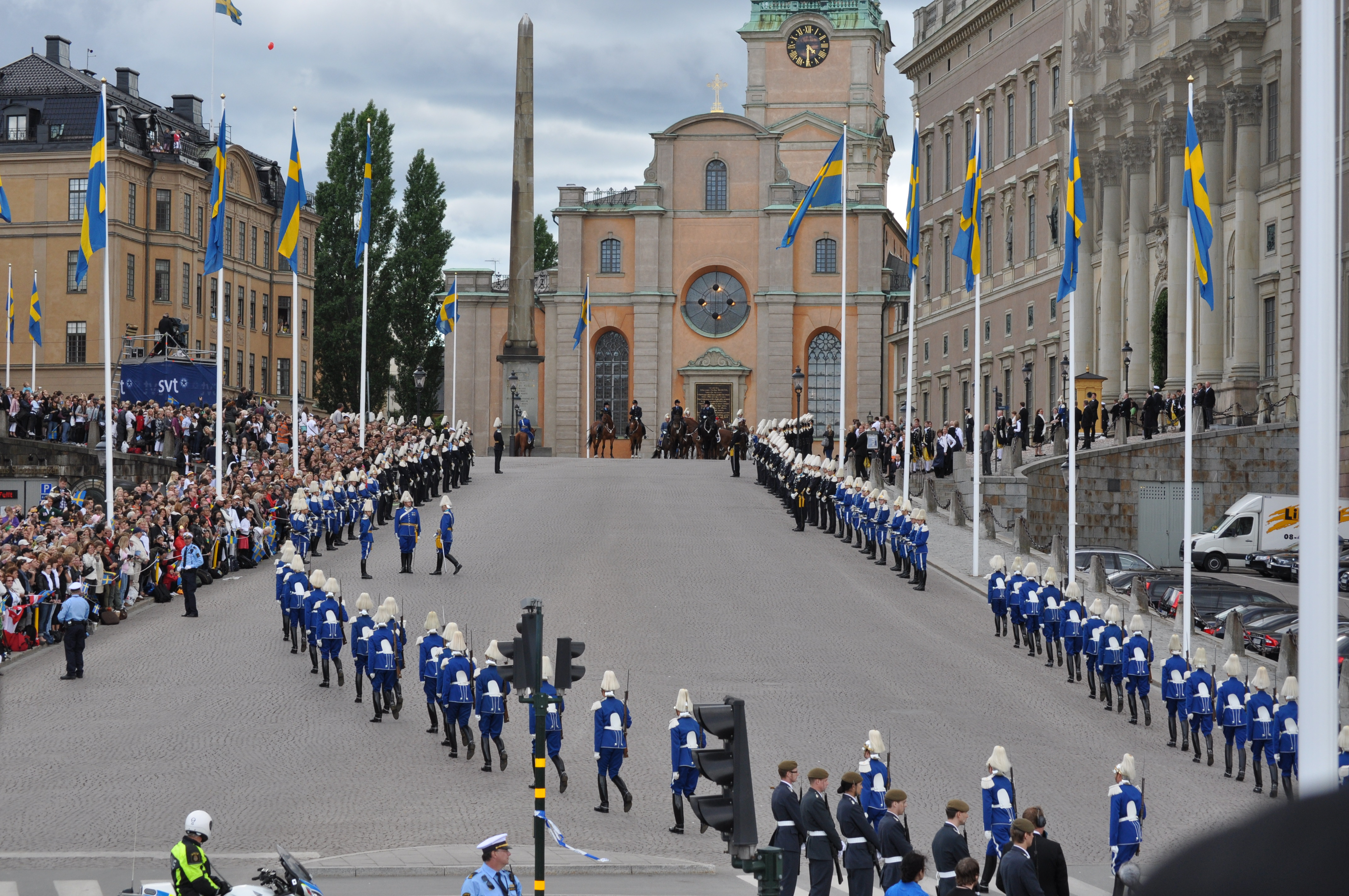 guards at slottsbacken